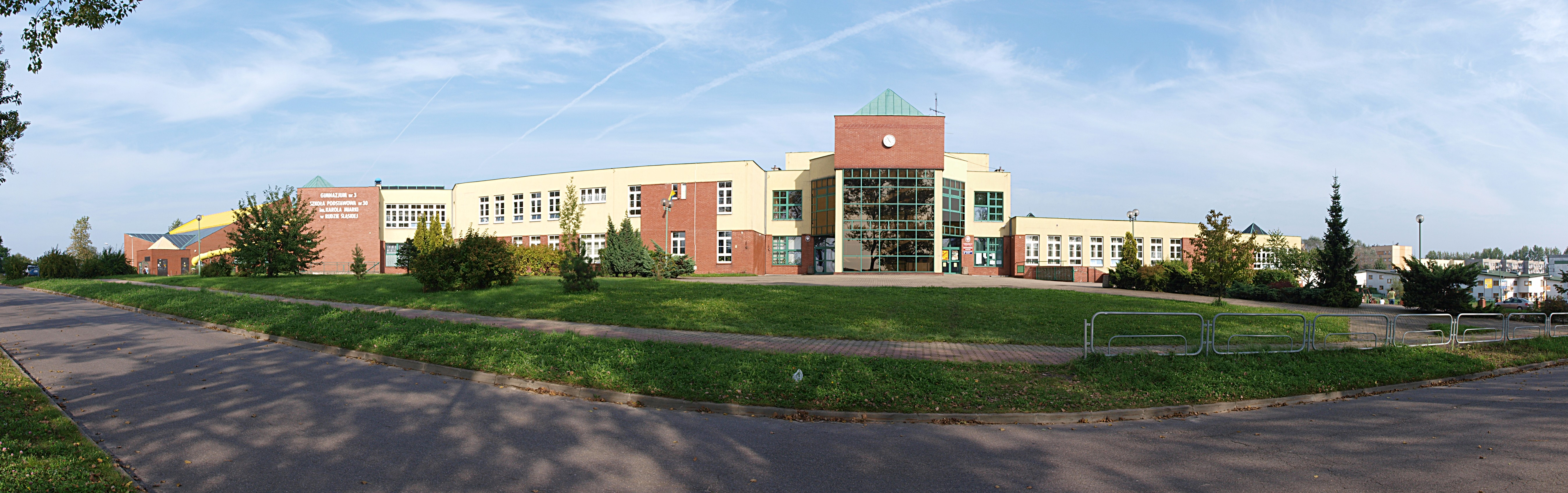 Ulica Chryzantem w Rudzie Śląskiej. Budynek mieszczący Szkołę Podstawową nr 30 i Gimnazjum nr 3.